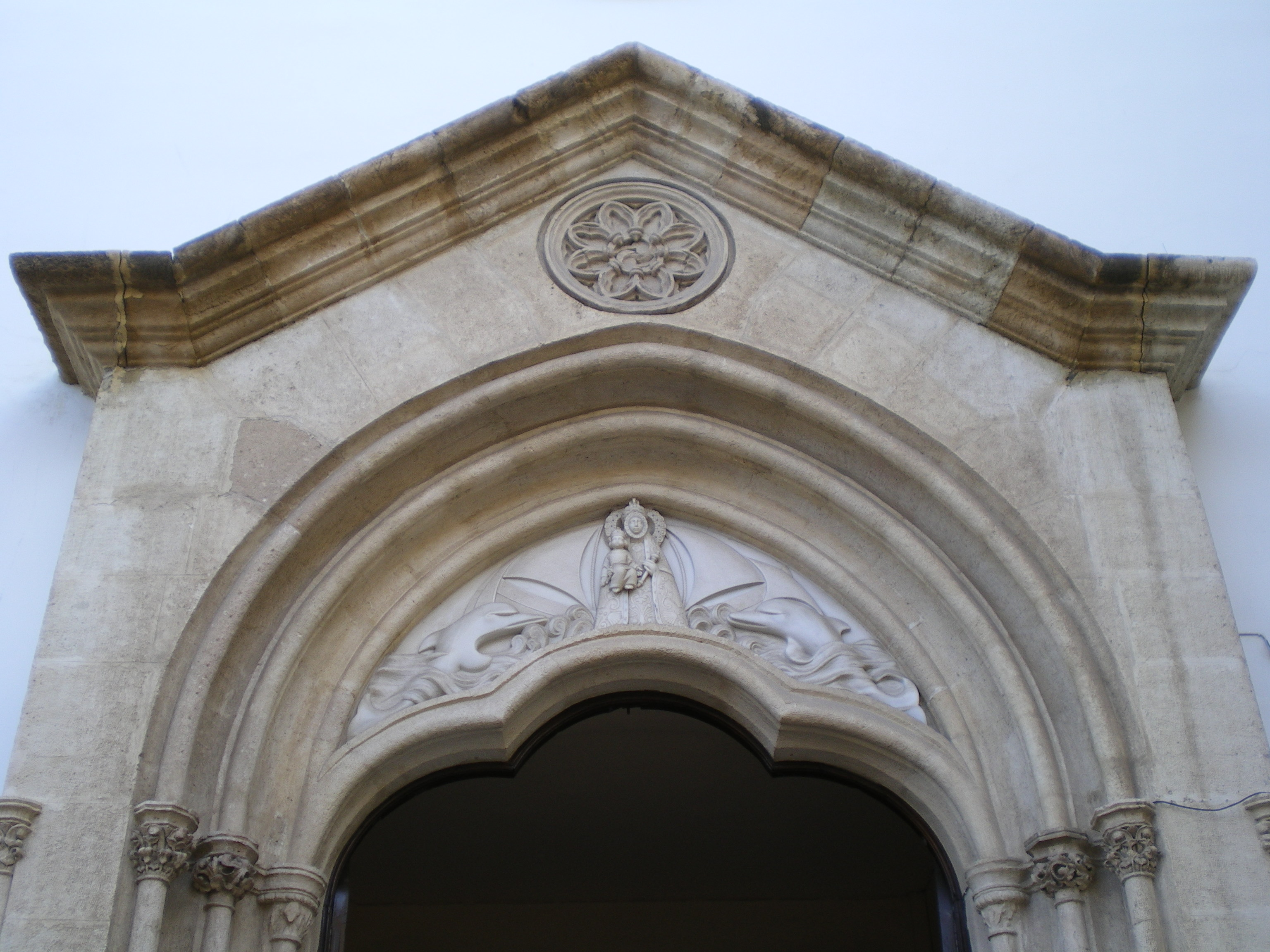 Fotografía de la imagen en piedra de la Virgen del Mar, Patrona de Almería, Andalucía, España, esculpida en la parte superior de la entrada sur de su Santuario.